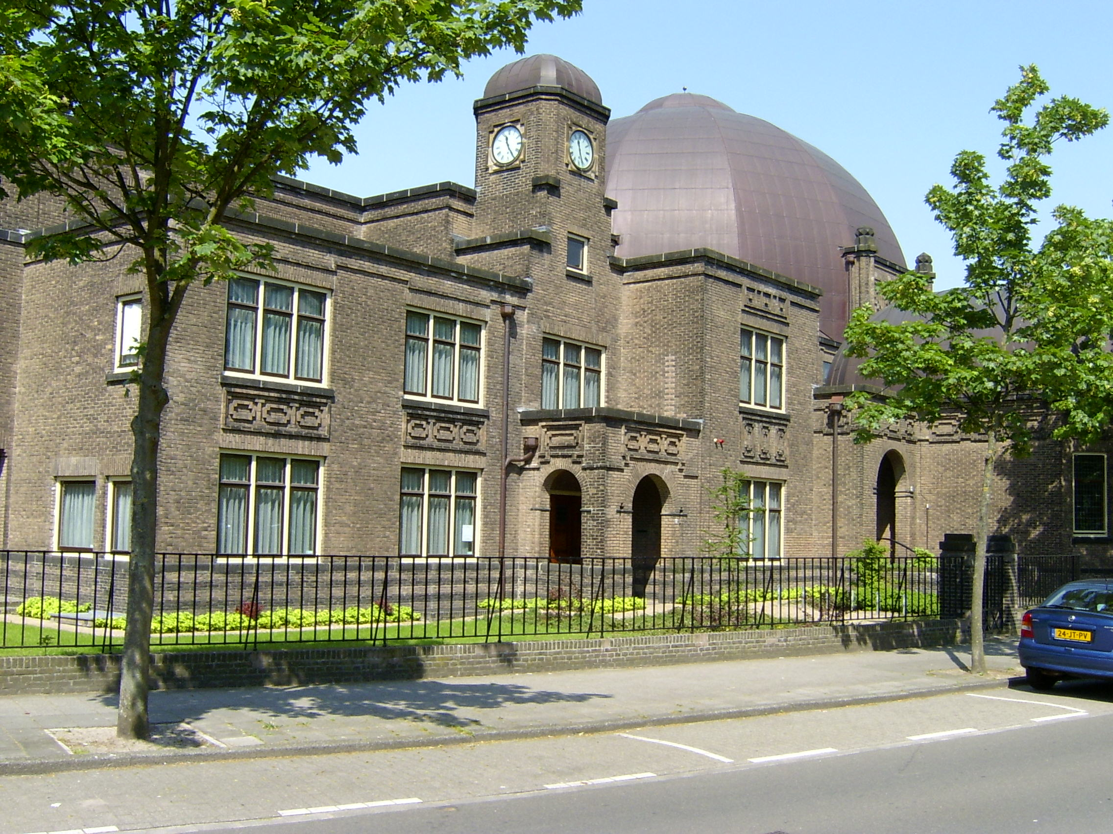 De gazzanwoning, het schoolgebouw en de synagoge voorkant (vlnr), Enschede